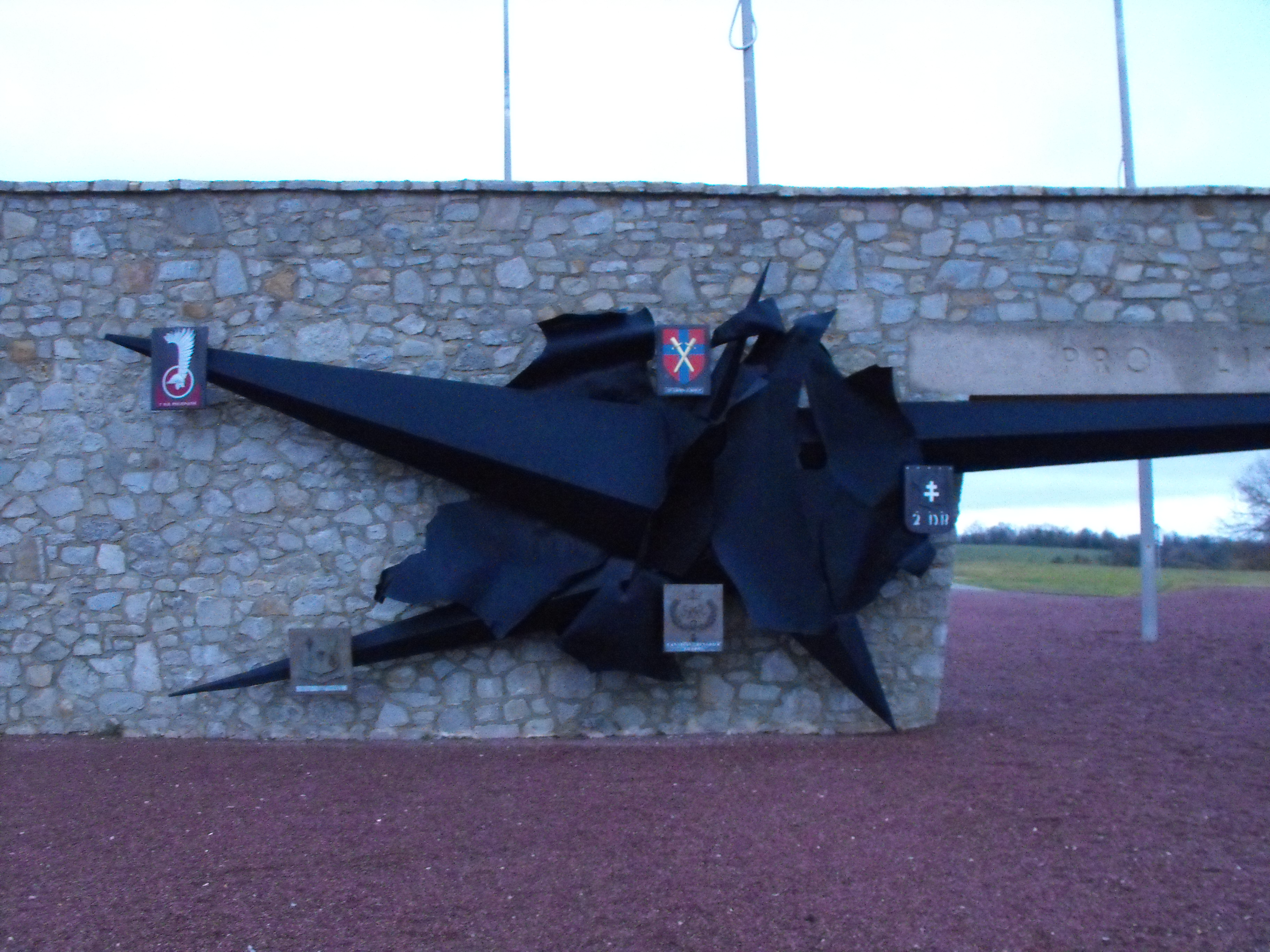 Mémorial de Coudehard-Montormel. Monument extérieur.